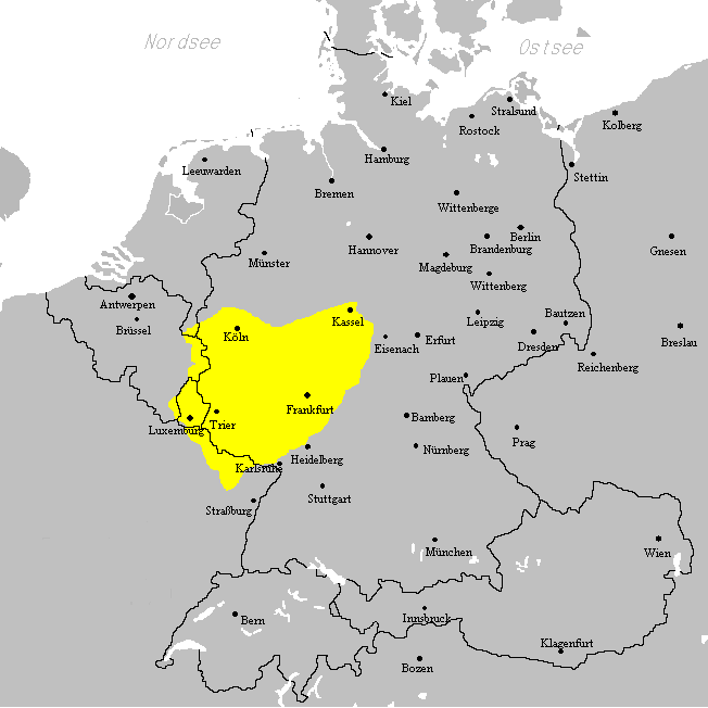 Verbreitungsgbiet des westmitteldeutschen Mundartgebiets.